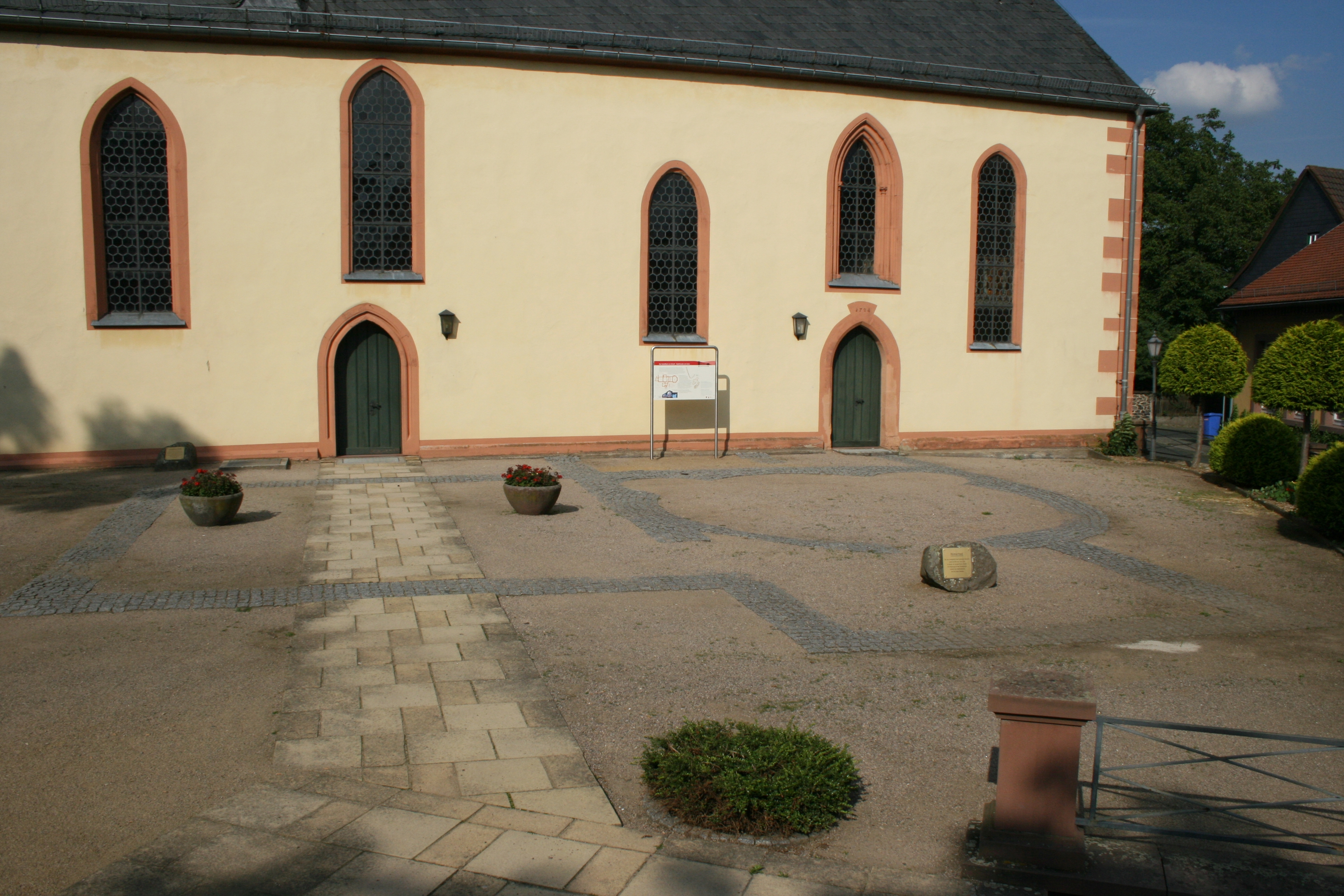 Im Pflaster vor der Kirche markiertes sudatorium des Kastellbades am Kastell Echzell.